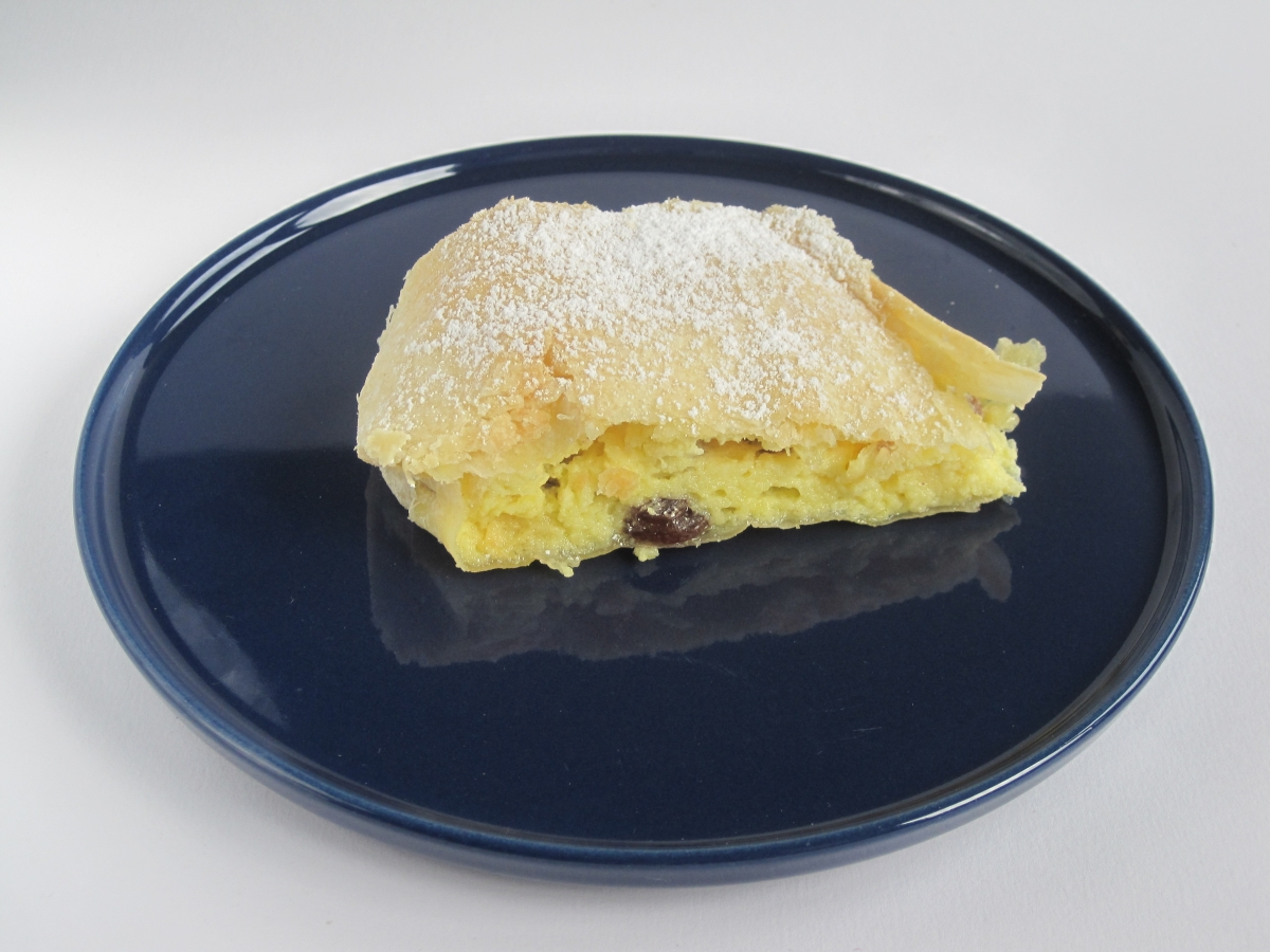 Quarkstrudel mit Rosinen